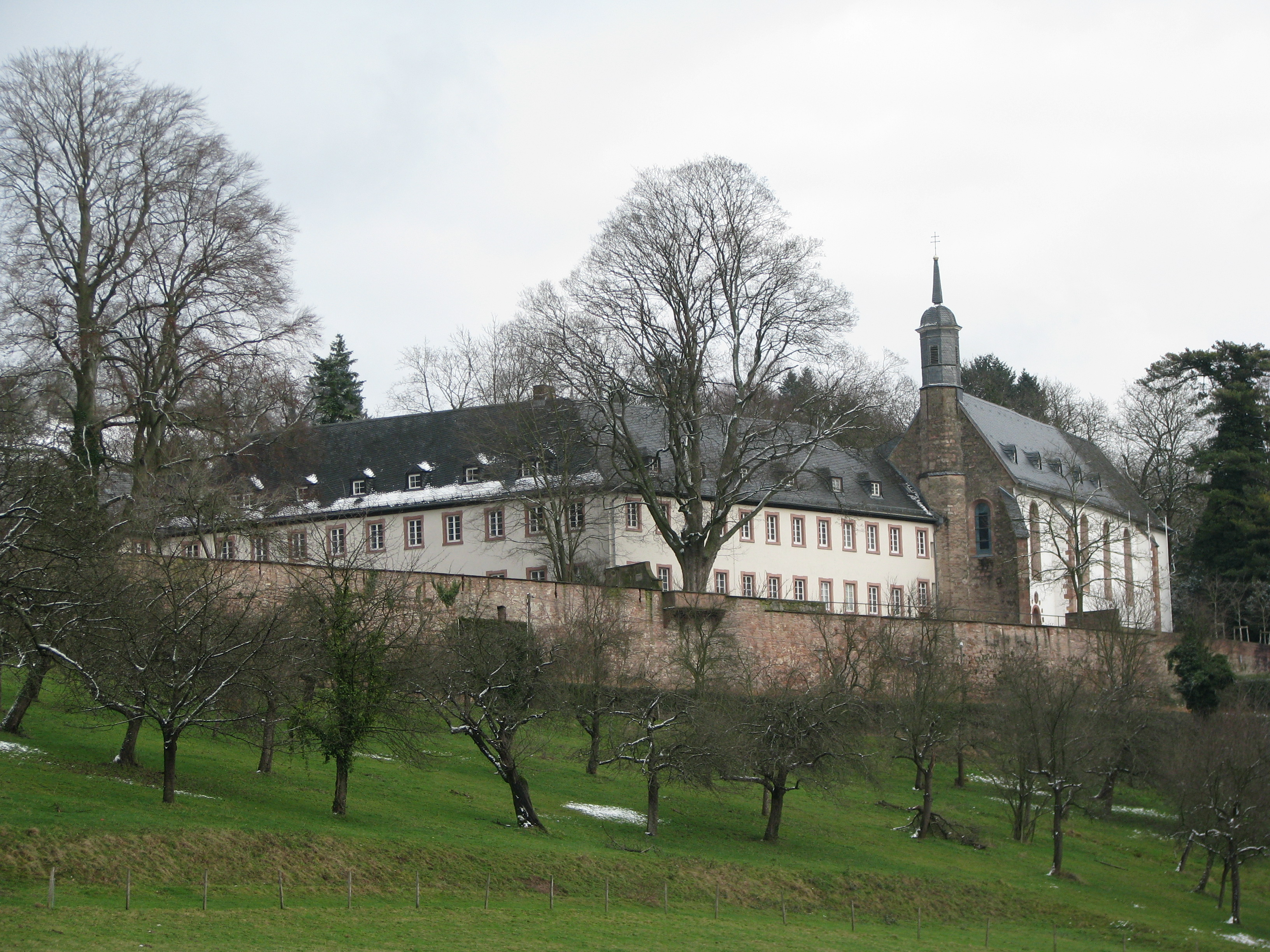 Stift Neuburg, Heidelberg-Ziegelhausen